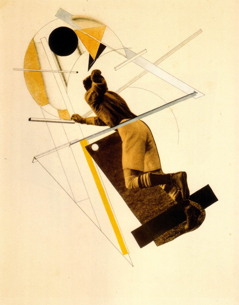 Лазарь Маркович Лисицкий (1890—1941). Футболист. Коллаж, 1922